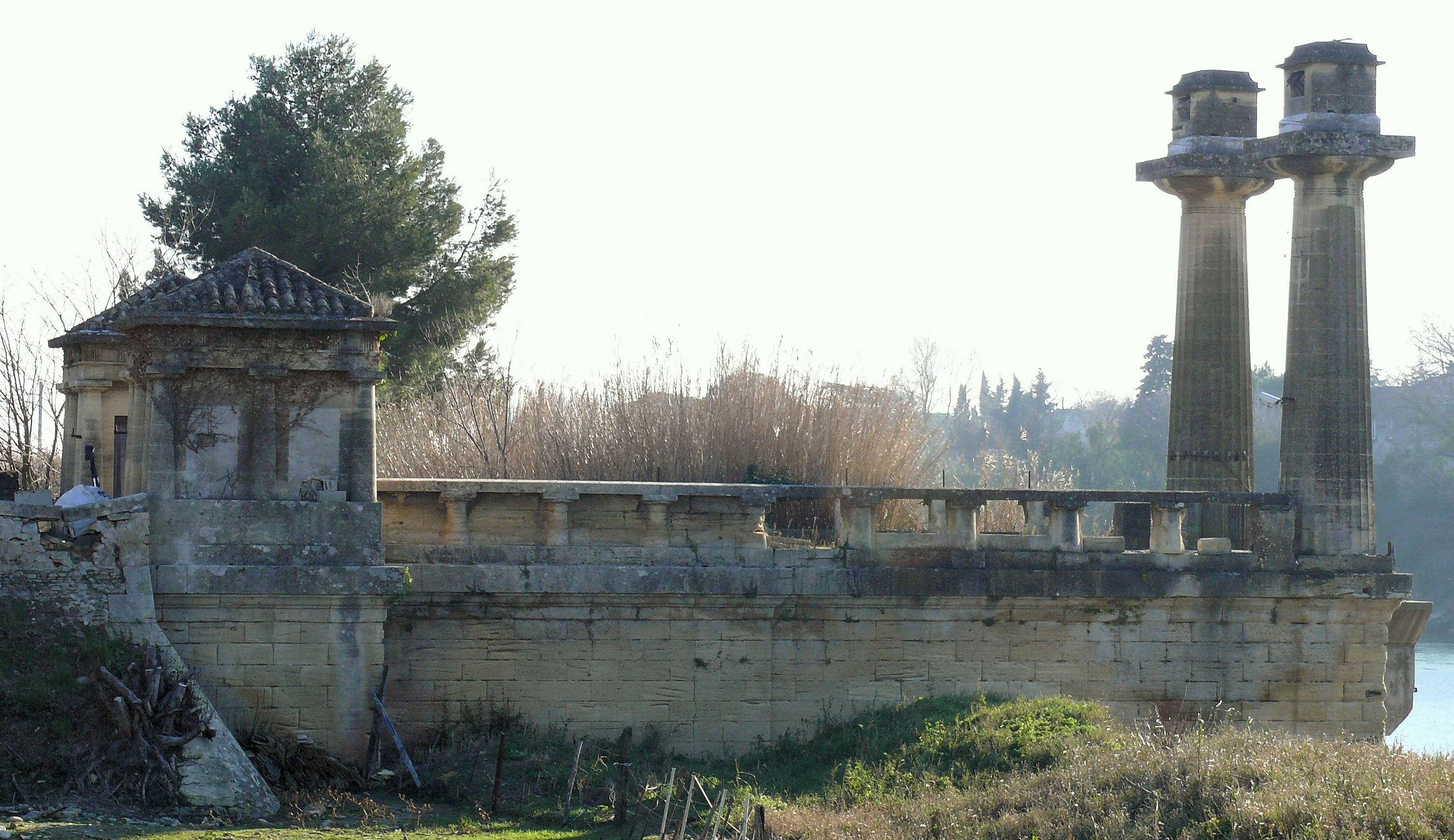 Remoulins - Vestiges du premier pont suspendu construit en 1830